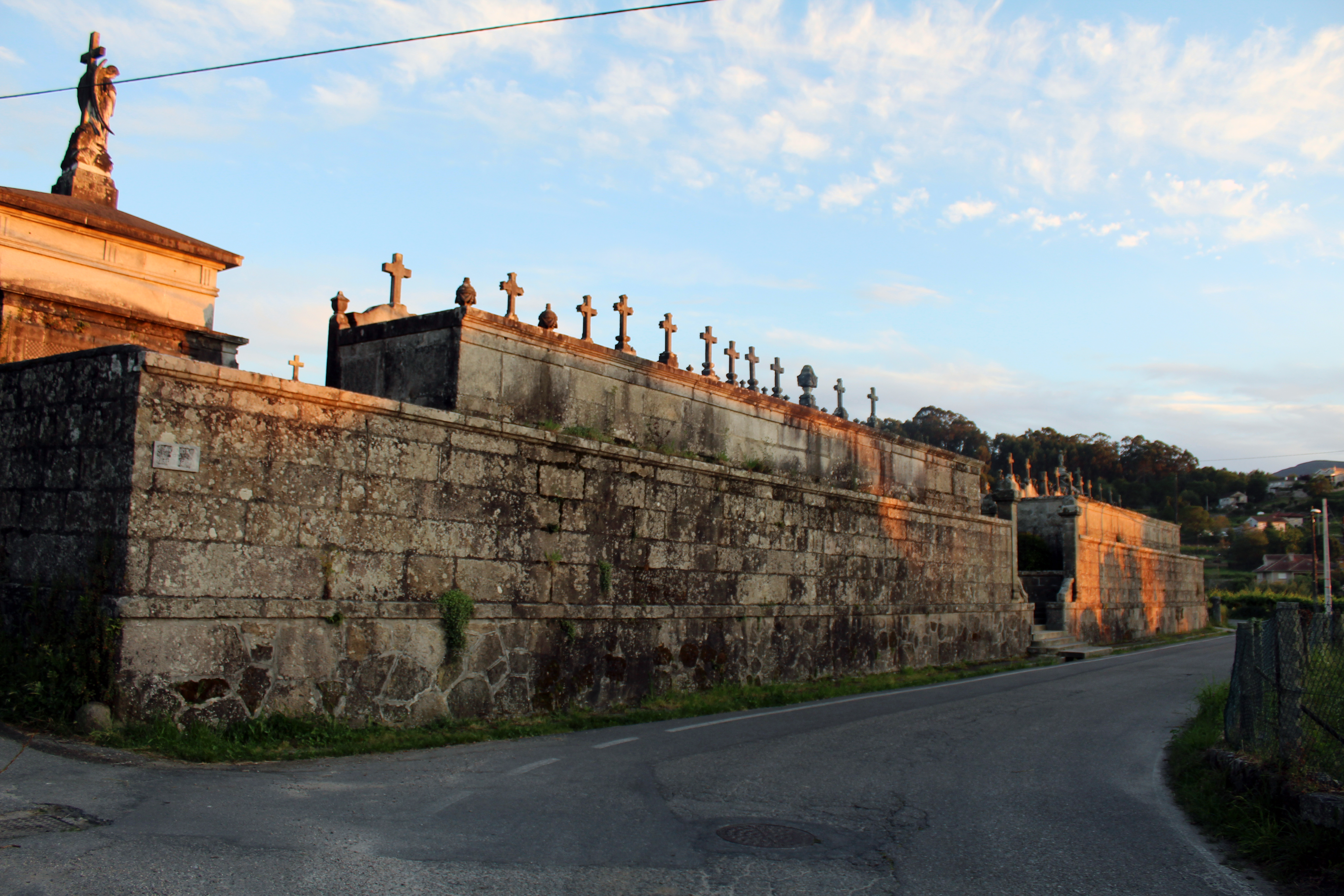 Cemiterio de Mañufe Gondomar